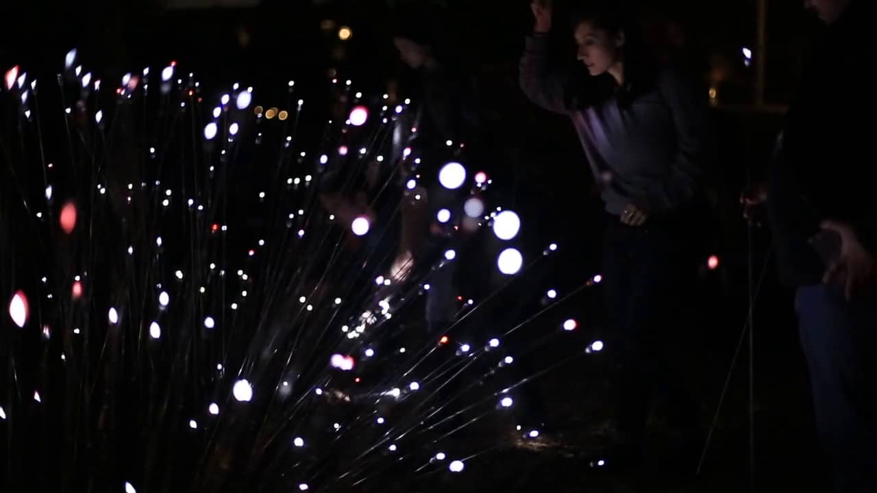 Imatge d'una de les instal·lacions de Domestic Data Streamers titulat "Lights of Wild" a la California Academy of Sciences